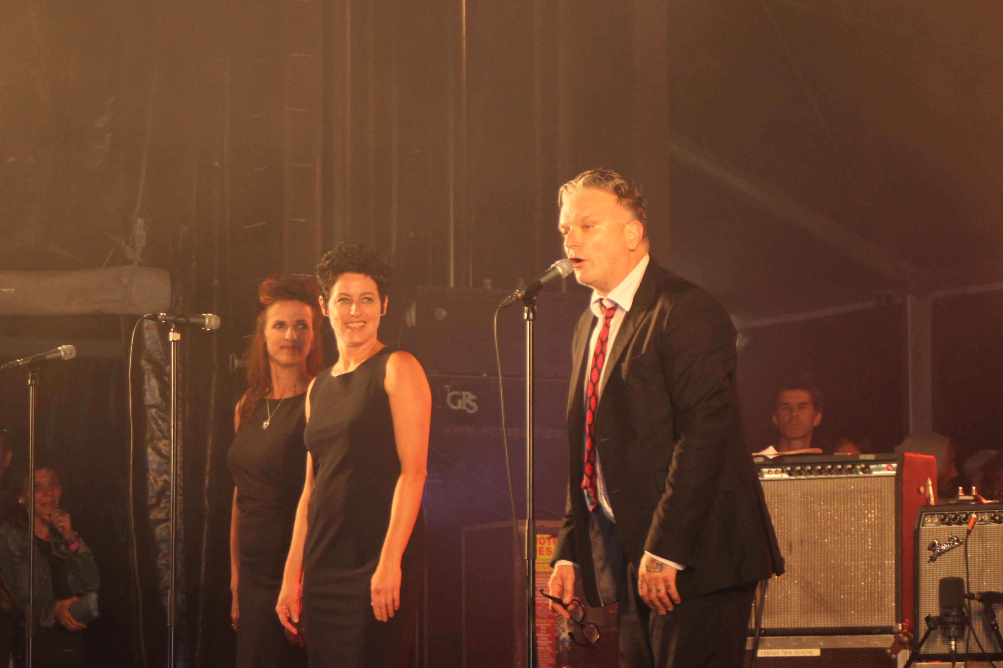 Sanseverino, à la ZàD, le 4 août 2013, Fr-44-Notre-Dame-des-Landes.